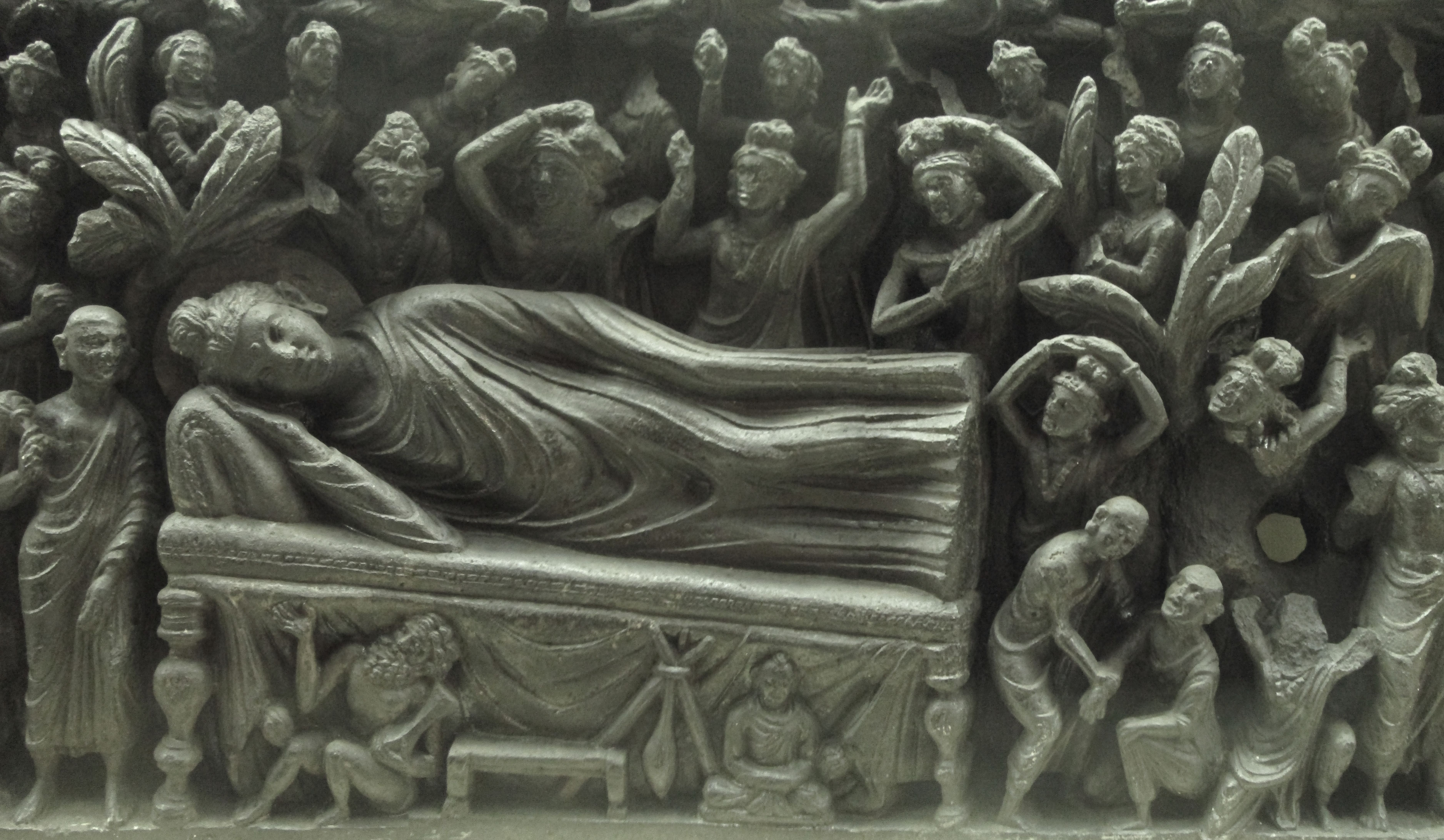 059 Parinibbana, Loriyan Tangai, at the Indian Museum, Kolkata Photograph from the Indian Museum in West Bengal taken by Anandajoti.